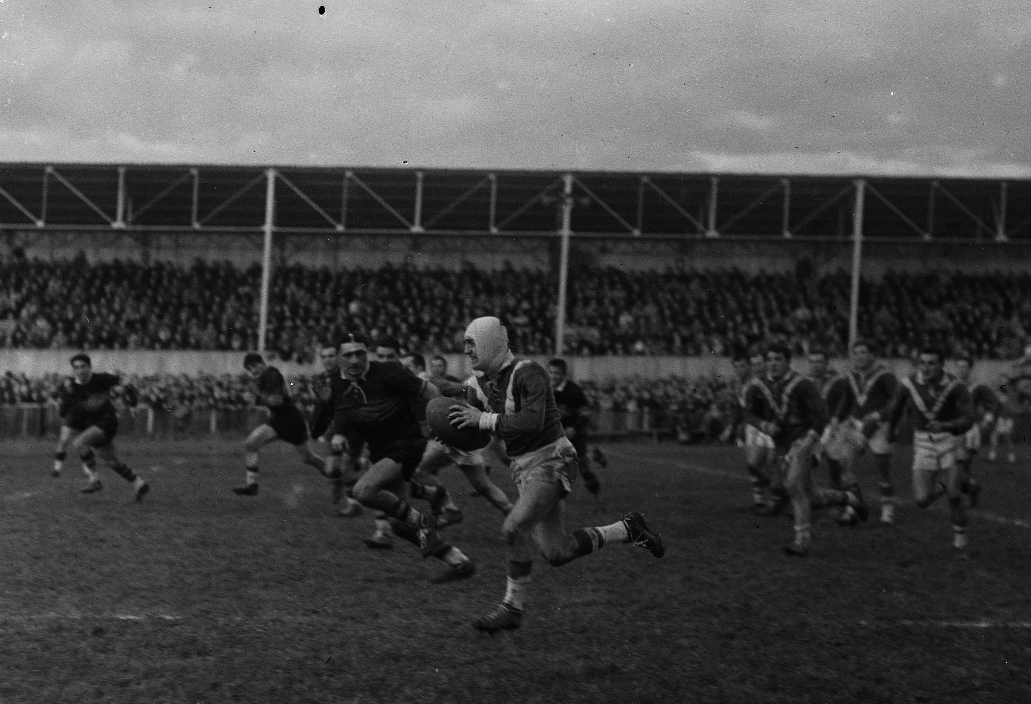 Stade Arnauné (stade des Minimes), rue Frédéric Estèbe. 1er janvier 1960. Pierre Lacaze, joueur du Toulouse Olympique XIII (rugby à XIII). Action de jeu. Au centre de la photo, Papillon Lacaze court avec le ballon, bandage autour de la tête ; en arrière plan tribune avec spectateurs.